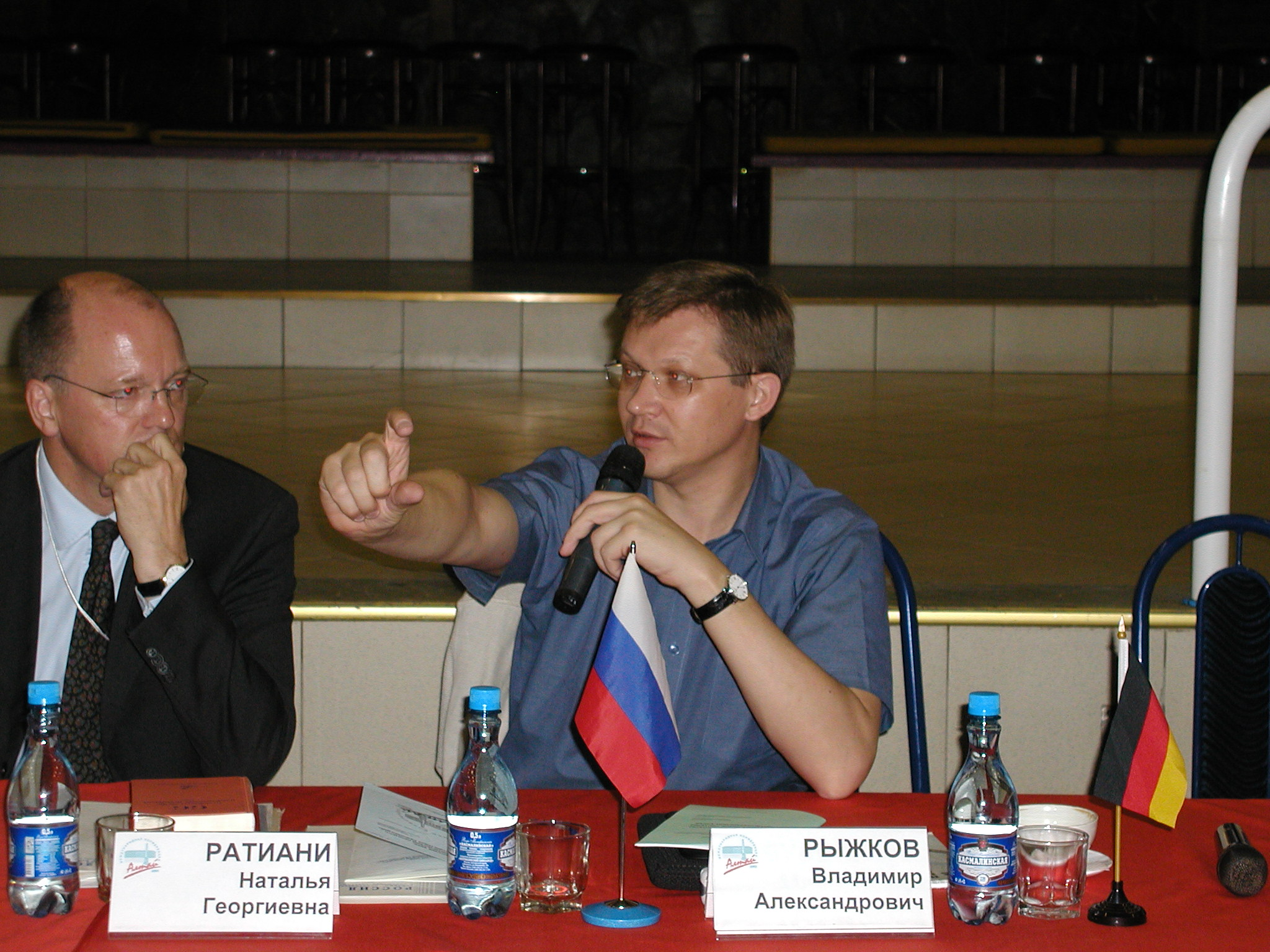 Рыжков Владимир Александрович на конференции Алтай 2005.